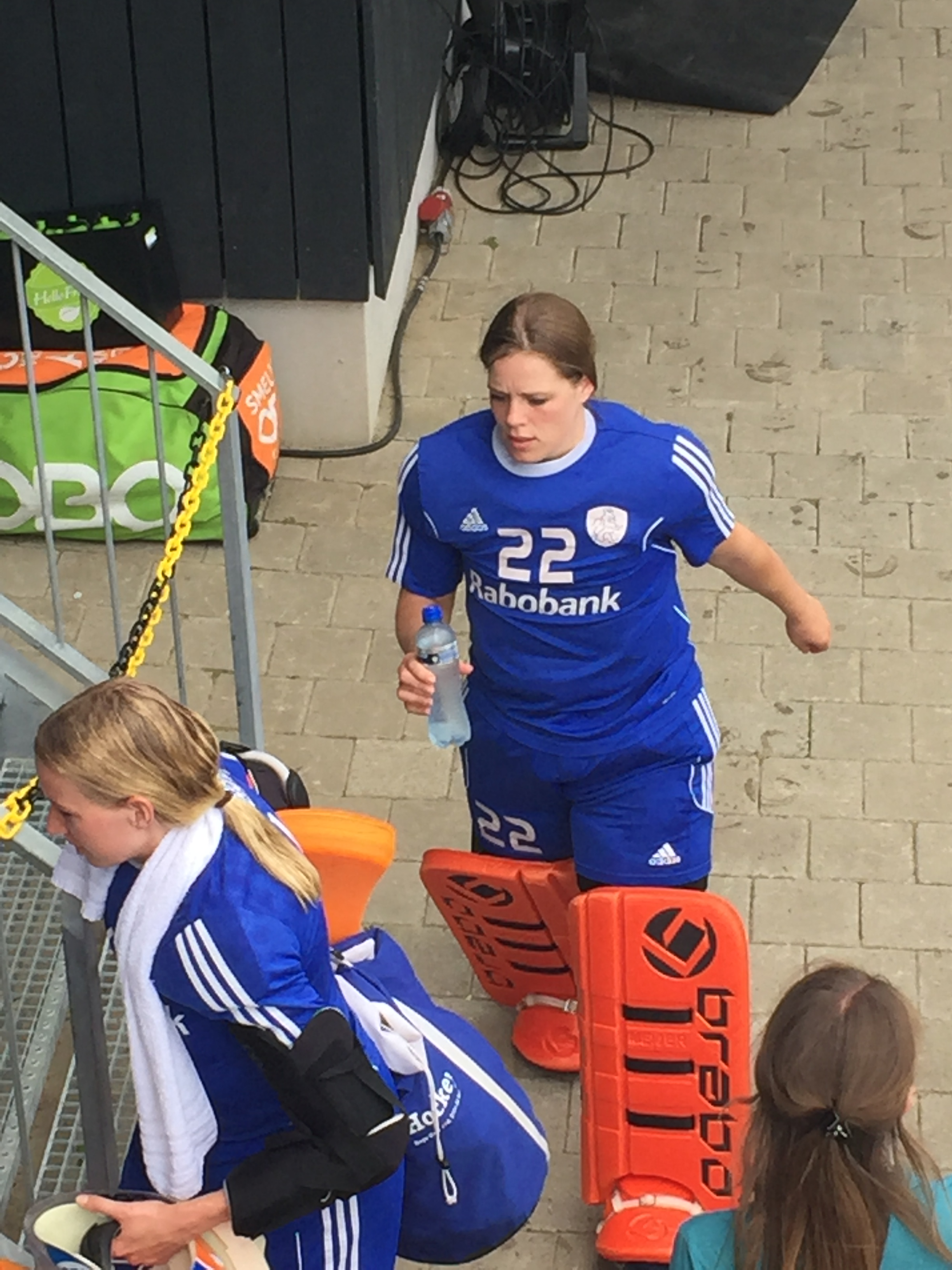 Larissa Meijer. Women's field hockey interland NED-BEL Women's field hockey interland NED-BEL Men's field hockey interland of the Netherlands against Belgium on 9 July 2016 in Den Bosch, the Netherlands. Part of the Rabo Super Serie Team the Netherlands: 1 Joyce Sombroek 2 Frederique Derkx 3 Xan de Waard 4 Kitty van Male 6 Laurien Leurink 7 Willemijn Bos 8 Marloes Keetels 9 Carlien Dirkse van den Heuvel 10 Kelly Jonker 11 Maria Verschoor 12 Lidewij Welten 13 Caia van Maasakker 14 Jacky Schoenaker 16 Michelle van der Pols 17 Maartje Paumen 18 Naomi van As 19 Ellen Hoog 20 Laura Nunnink 21 Lauren Stam 22 Larissa Meijer 23 Margot van Geffen 24 Eva de Goede 29 Maartje Krekelaar 20 Anne Veenendaal